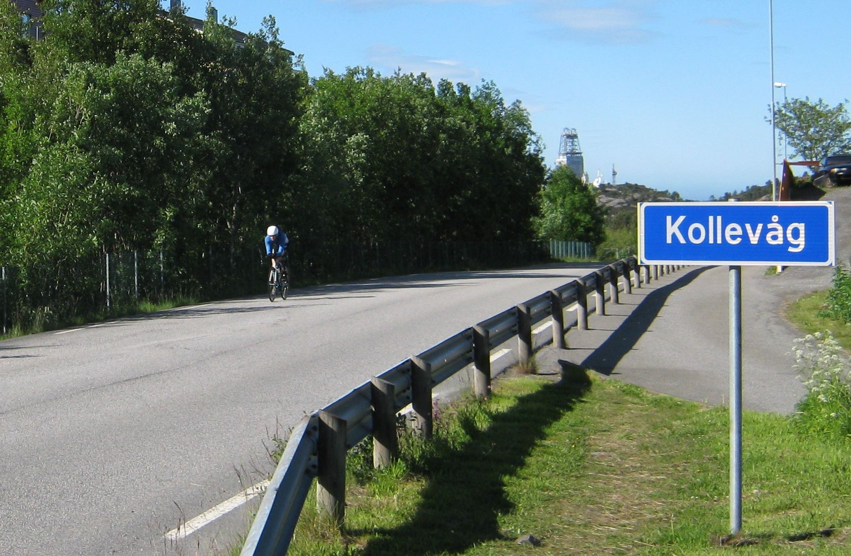 En rytter passerer skiltet Kollevåg som tredjemann på første runding av sykkeletappen under Bergen Trithlon 2010.